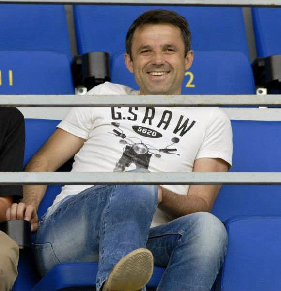 Nekdanji SLO nogometaš sedaj trener Dušan Kosič